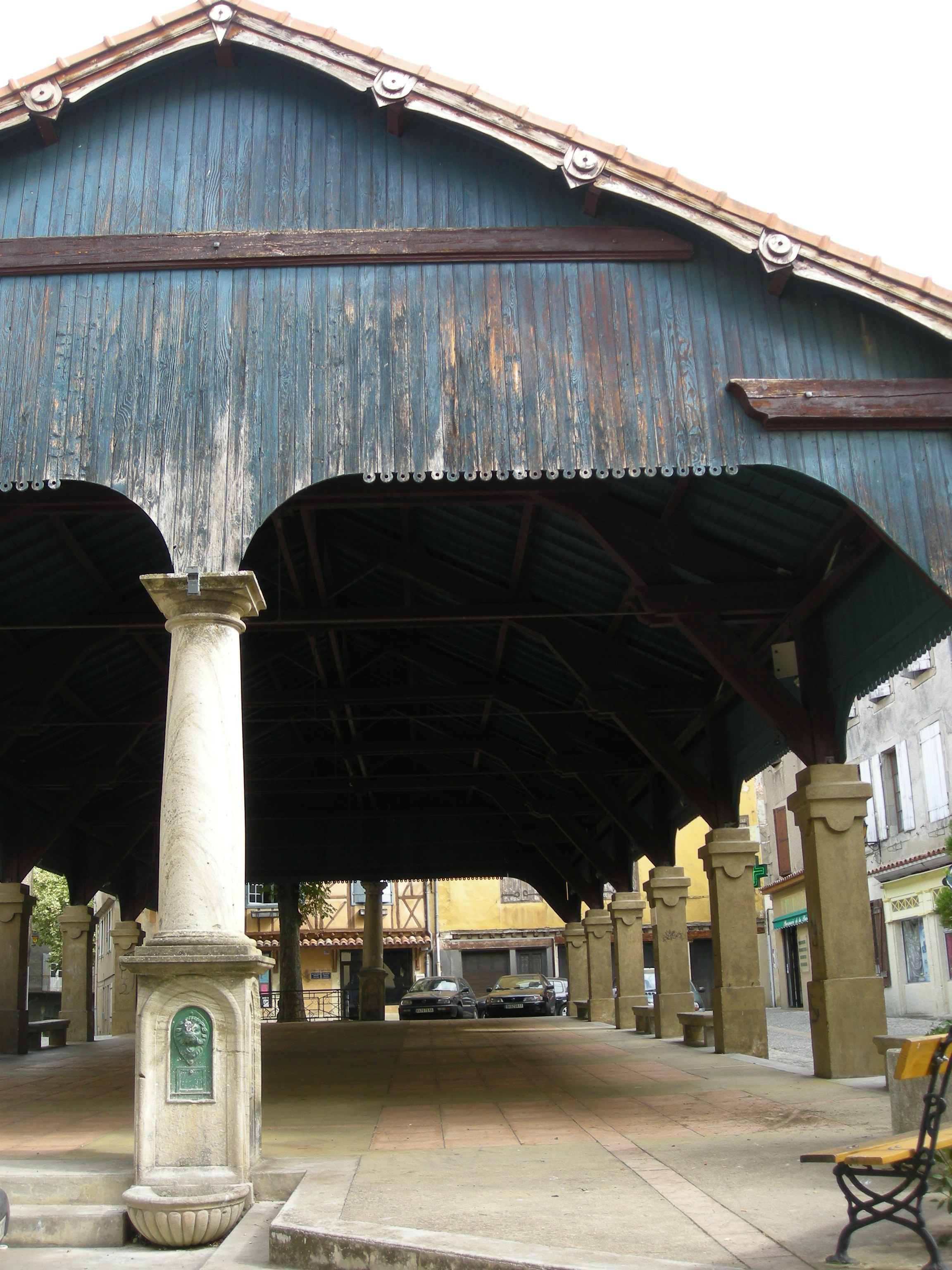 Halle aux grains de Chalabre (Aude, France).